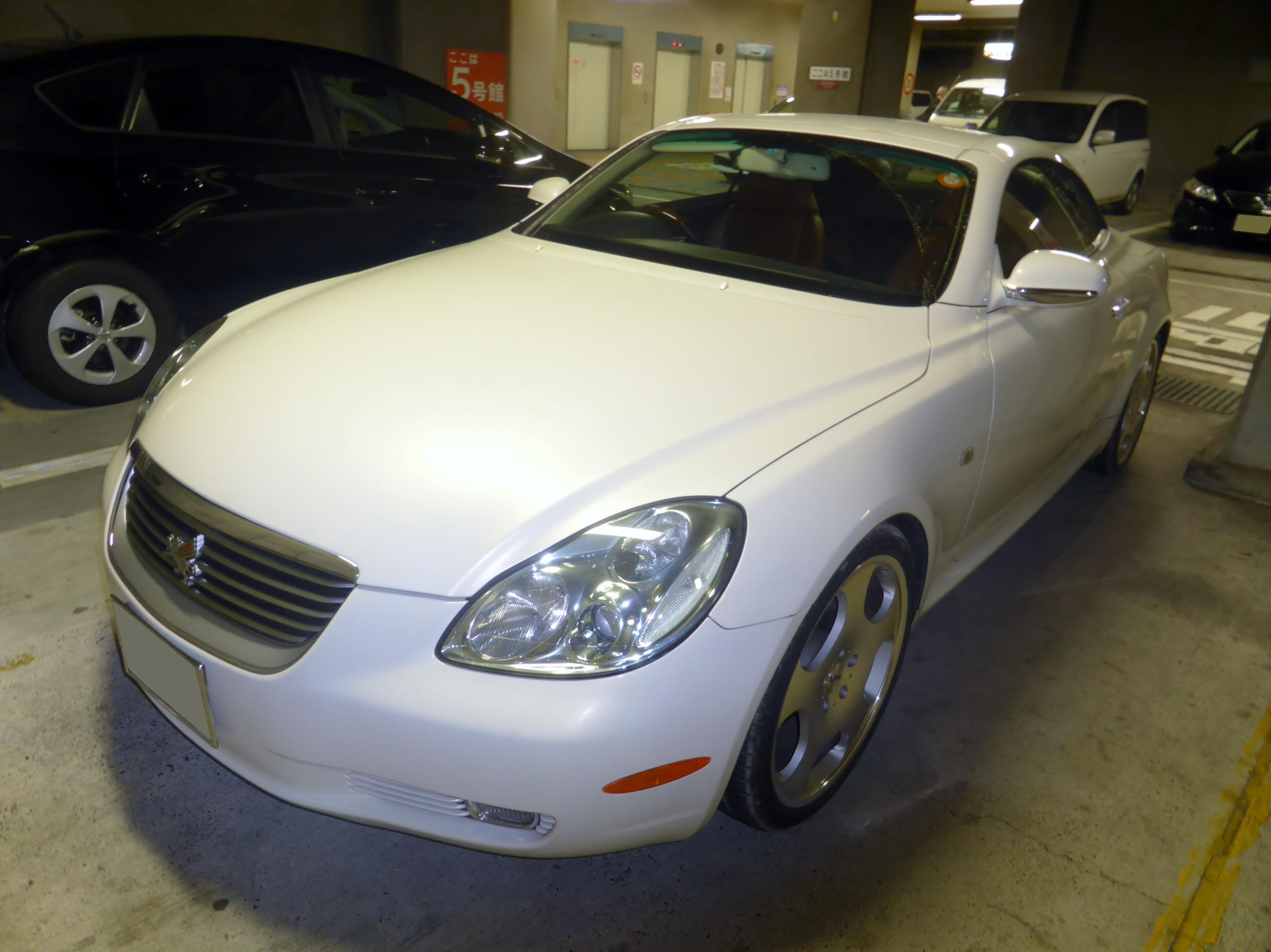 UZZ40型トヨタ・ソアラをフロントから撮影。